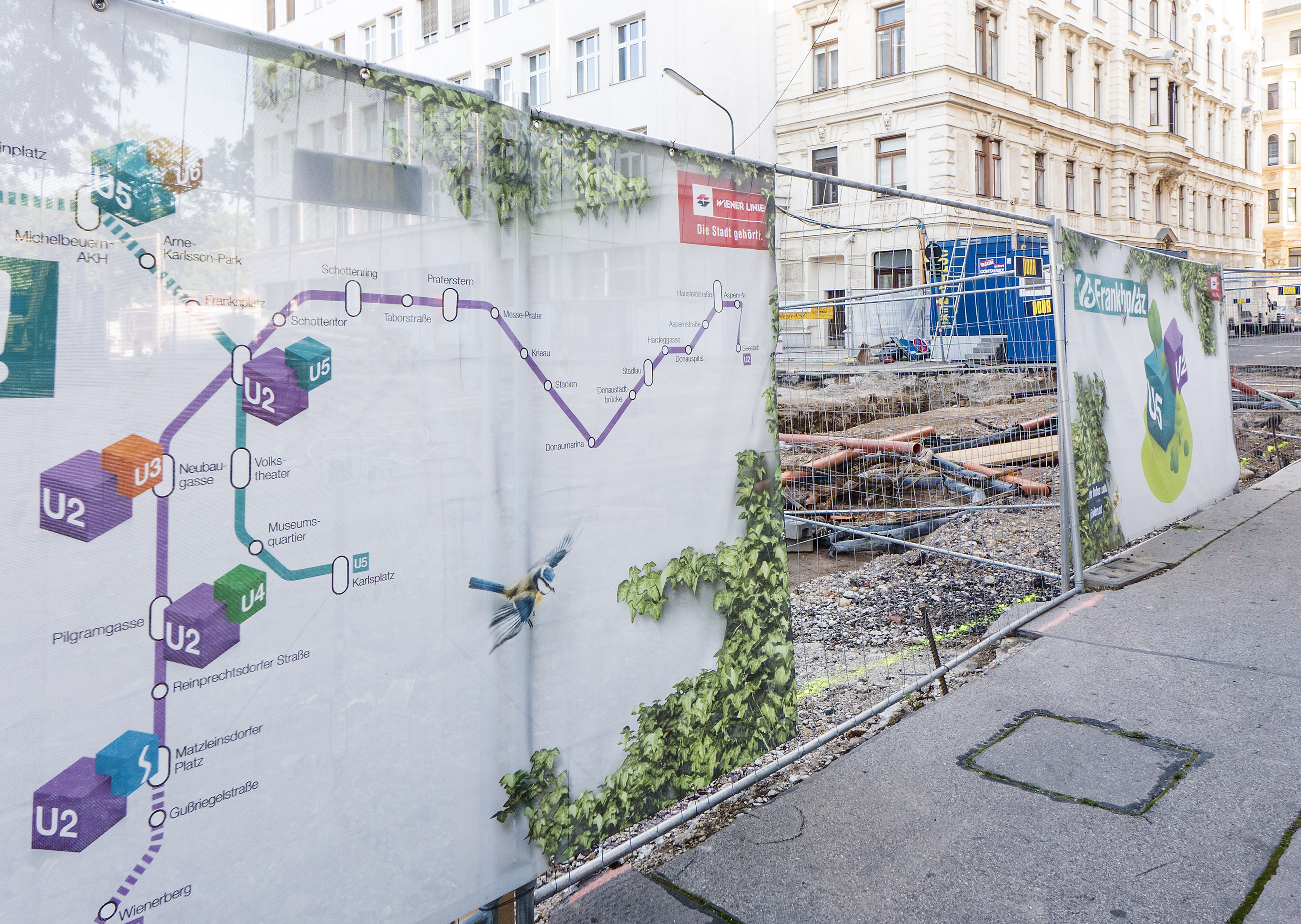 Baustelle der U5 am Frankhplatz